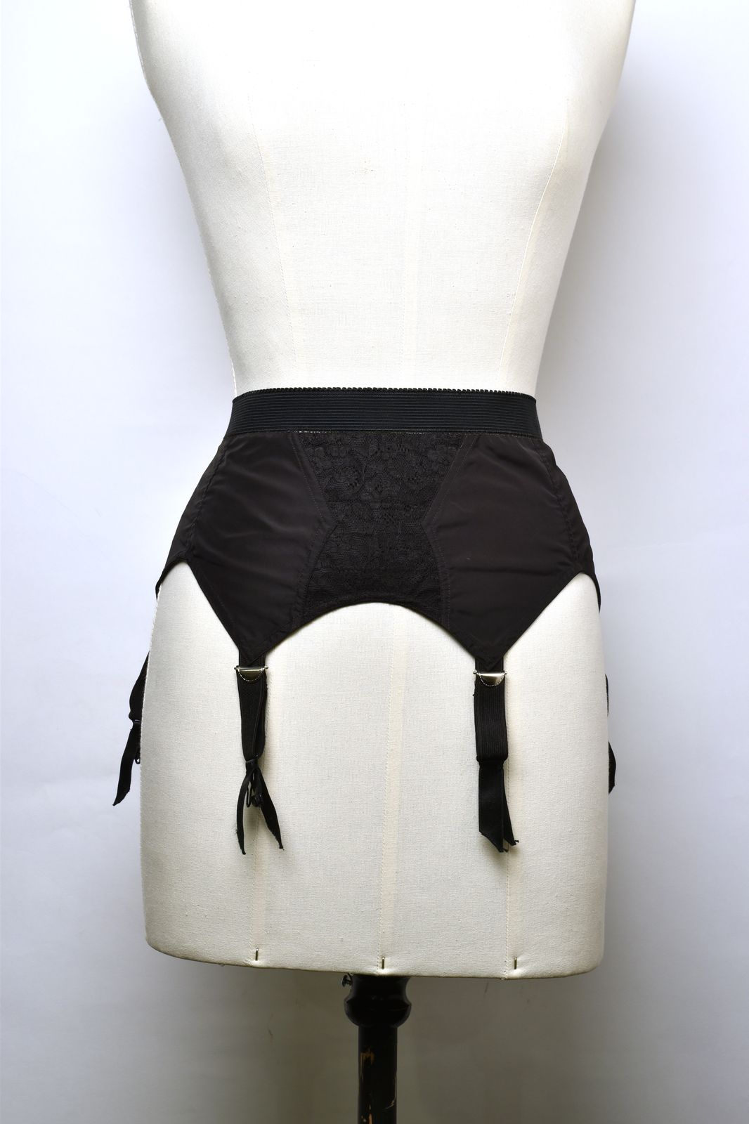 Zwarte jarretelgordel met elastieken tailleband en vier gespen om kousen aan vast te maken. Sluit achter met haak en oog. Middenvoor is in zandlopervorm een stuk kant verwerkt.